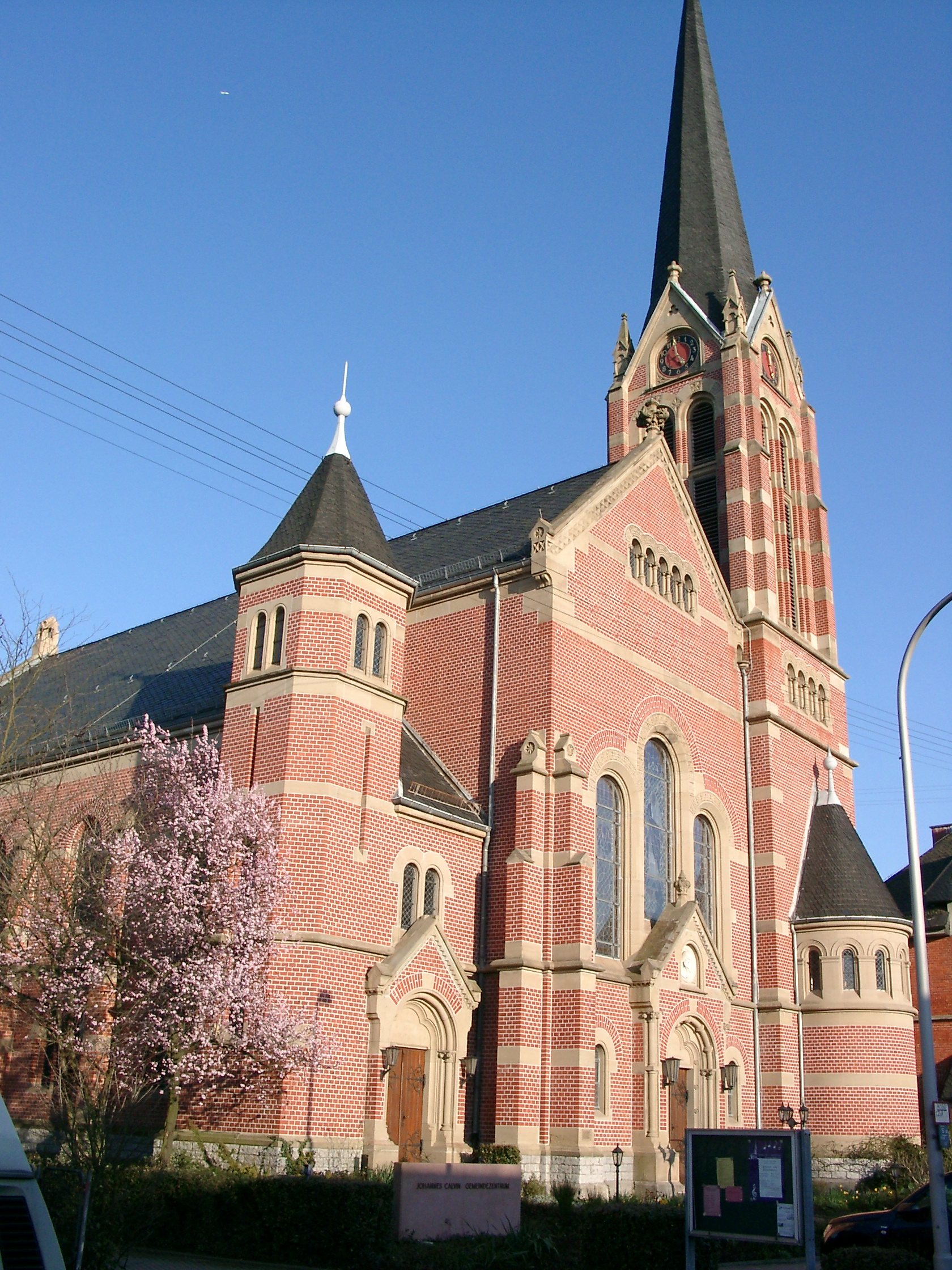 Mannheim-Friedrichsfeld, Johannes Calvin Gemeindezentrum